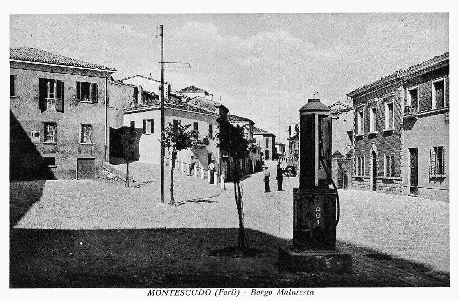 Montescudo, Borgo Malatesta. Archivio comunale.